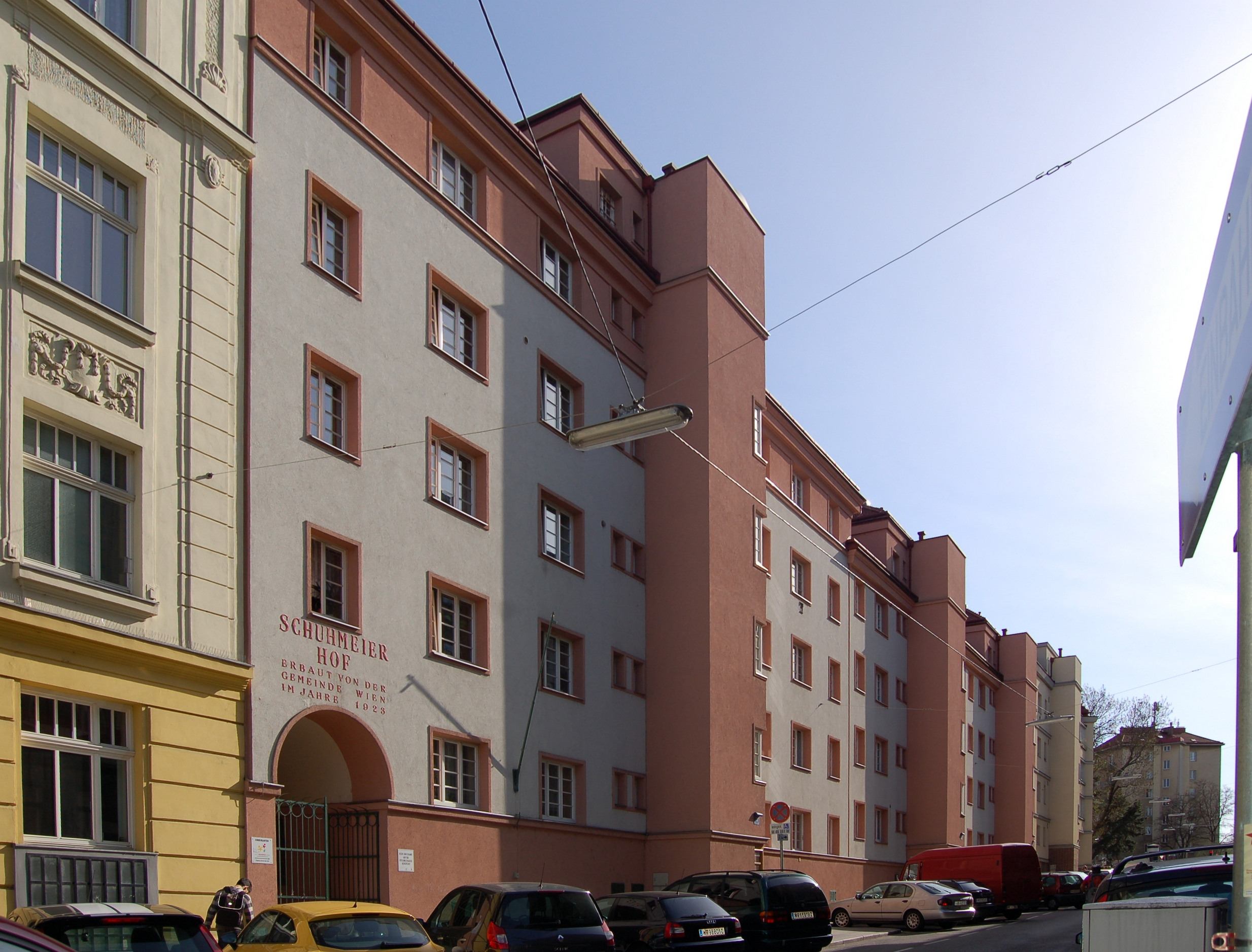 Der Schuhmeier-Hof in Wien-Ottakring, Fassade in der Pfenninggeldgasse 6-12.